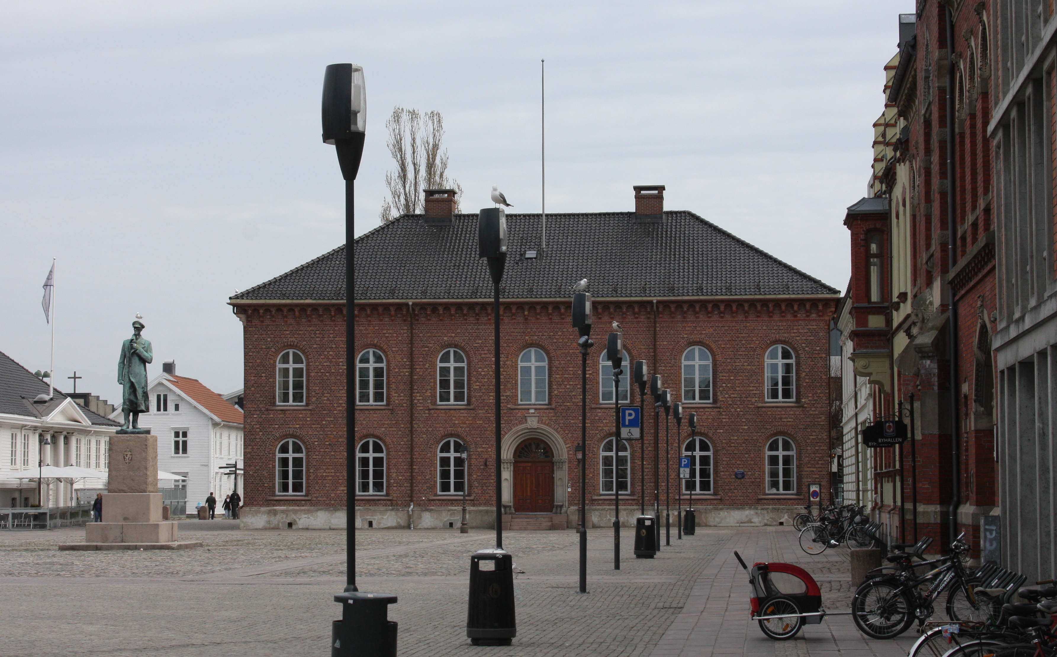 Kristiansand Rådhus og Torget. Murbyen ble bygget etter bybrannen 1892, og det skjedde under murtvang. Hele området har "nasjonal verneinteresse". Ennå ikke tildelt vernestatus eller ID-nummer som kulturminne. Riksantikvaren